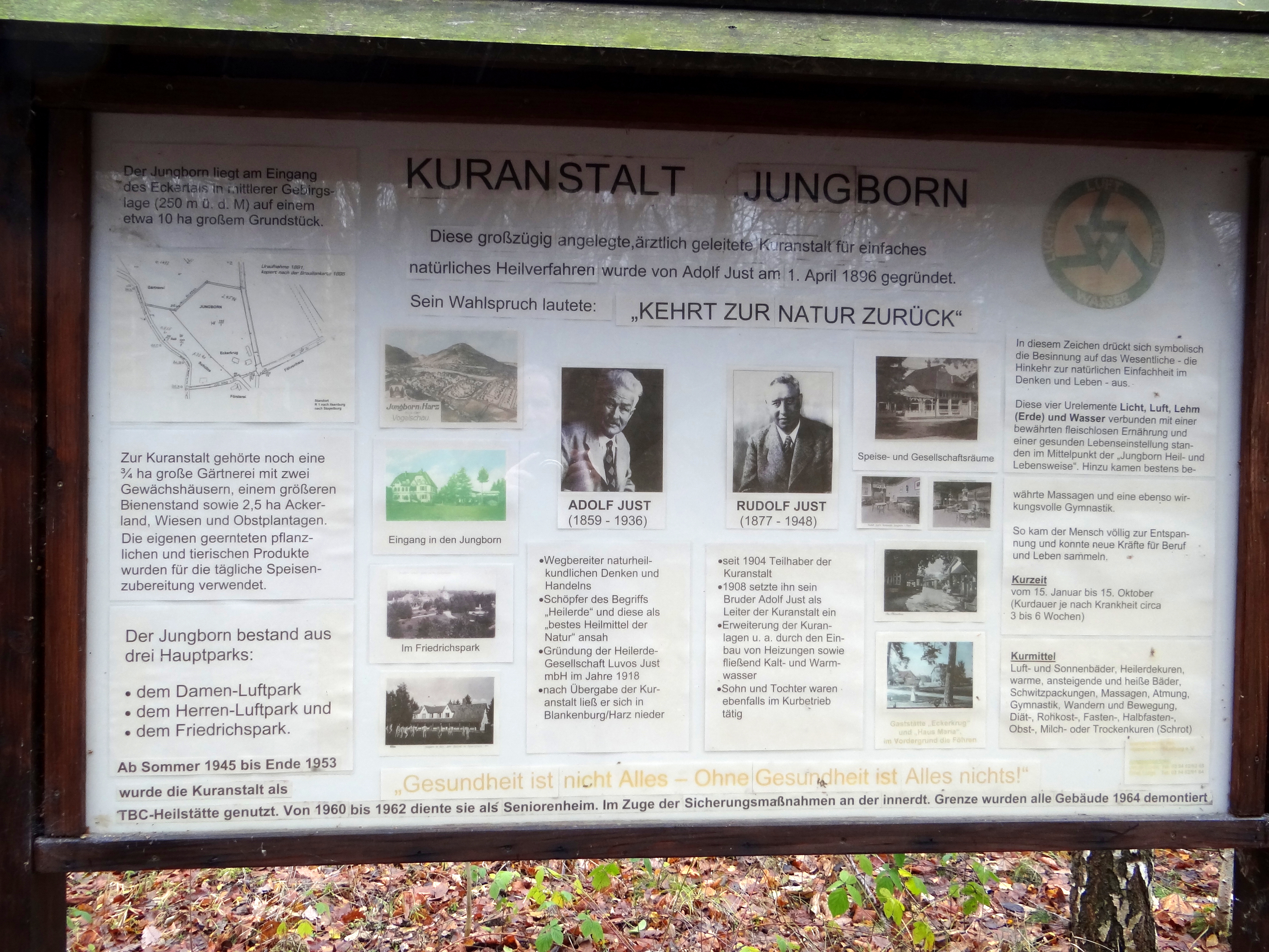 Stelltafel am Eingang des ehemaligen Jungborn-Geländes (Urheber vermutlich der Heimatverein Stapelburg) im Eckertal bei Stapelburg.